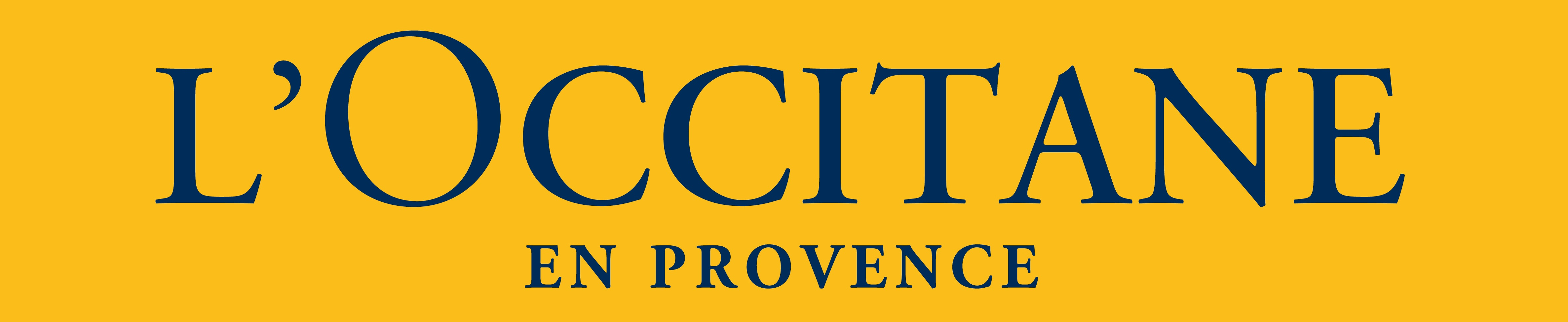 Logo de marque L'OCCITANE en Provence